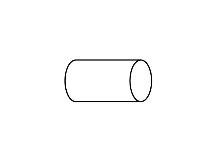 Tubo que representa un agujero de gusano.